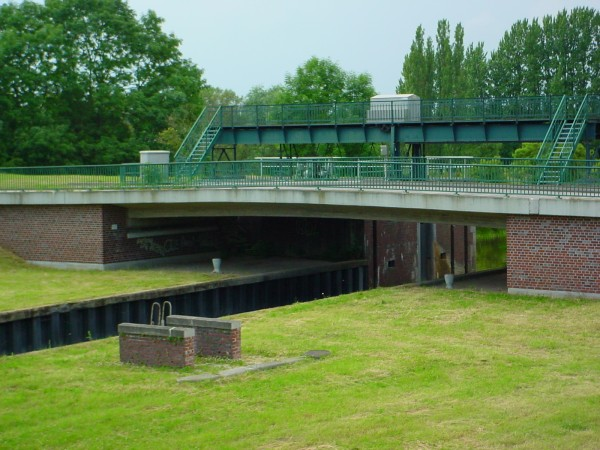 Naturschutzgebiet "Die Reit", Dove Elbe, Gose Elbe